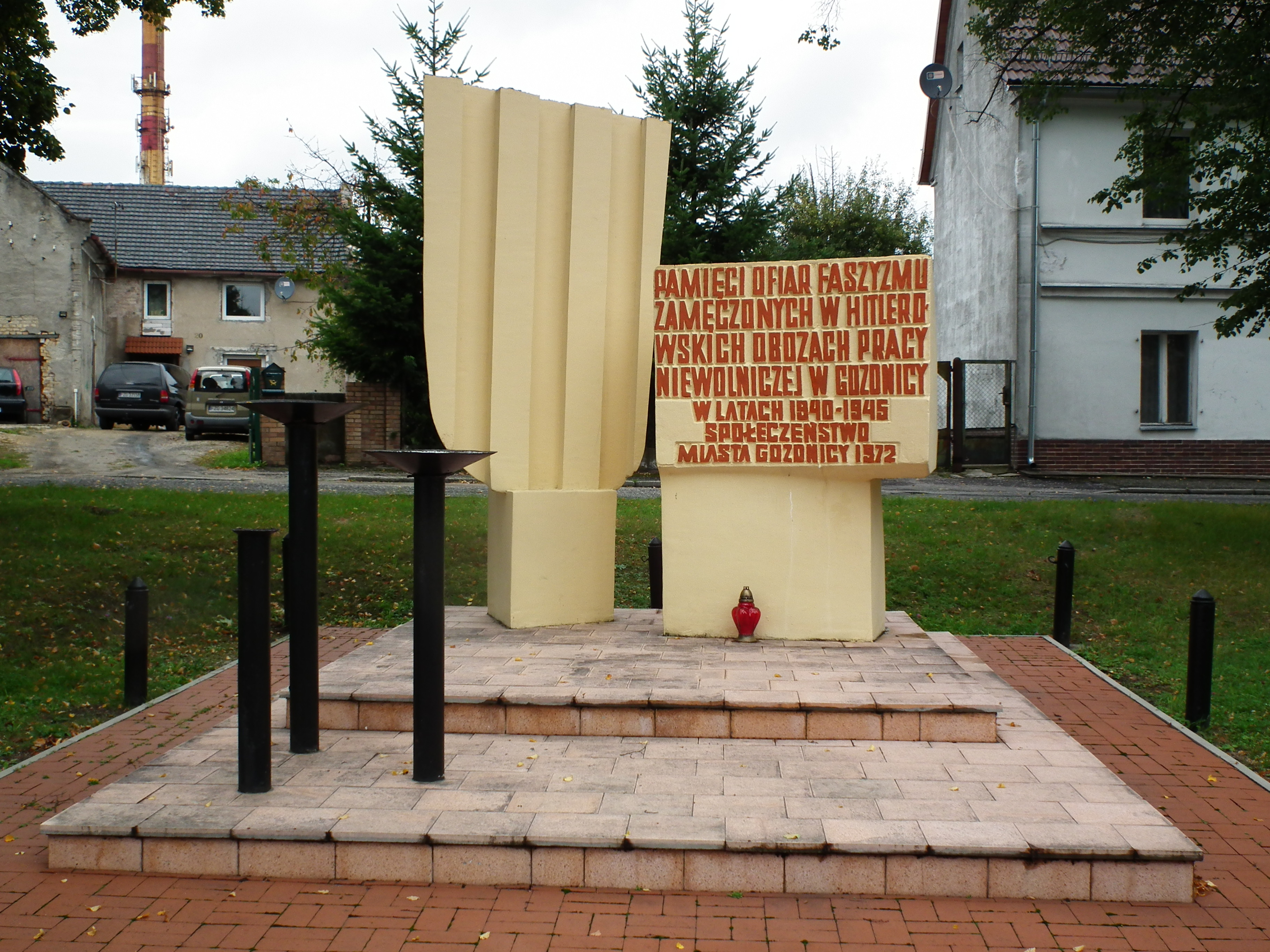 Widok miejski z Gozdnicy. Pomnik ofiar niemieckiego nazizmu.